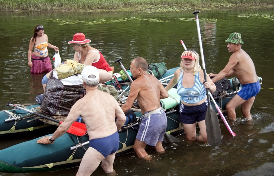 Грушинский фестиваль, Самарская область, Россия